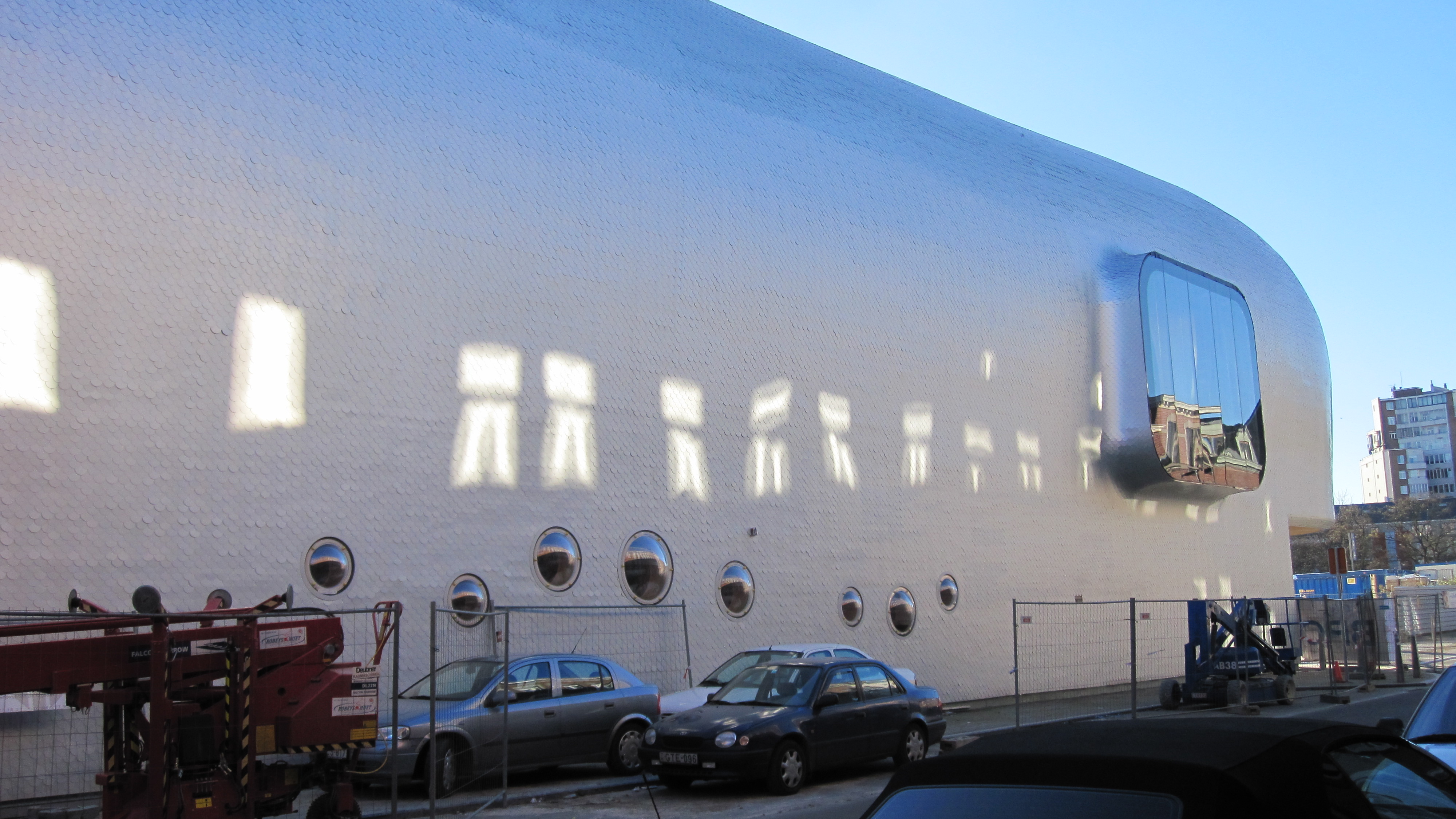 Patinoire du Longdoz